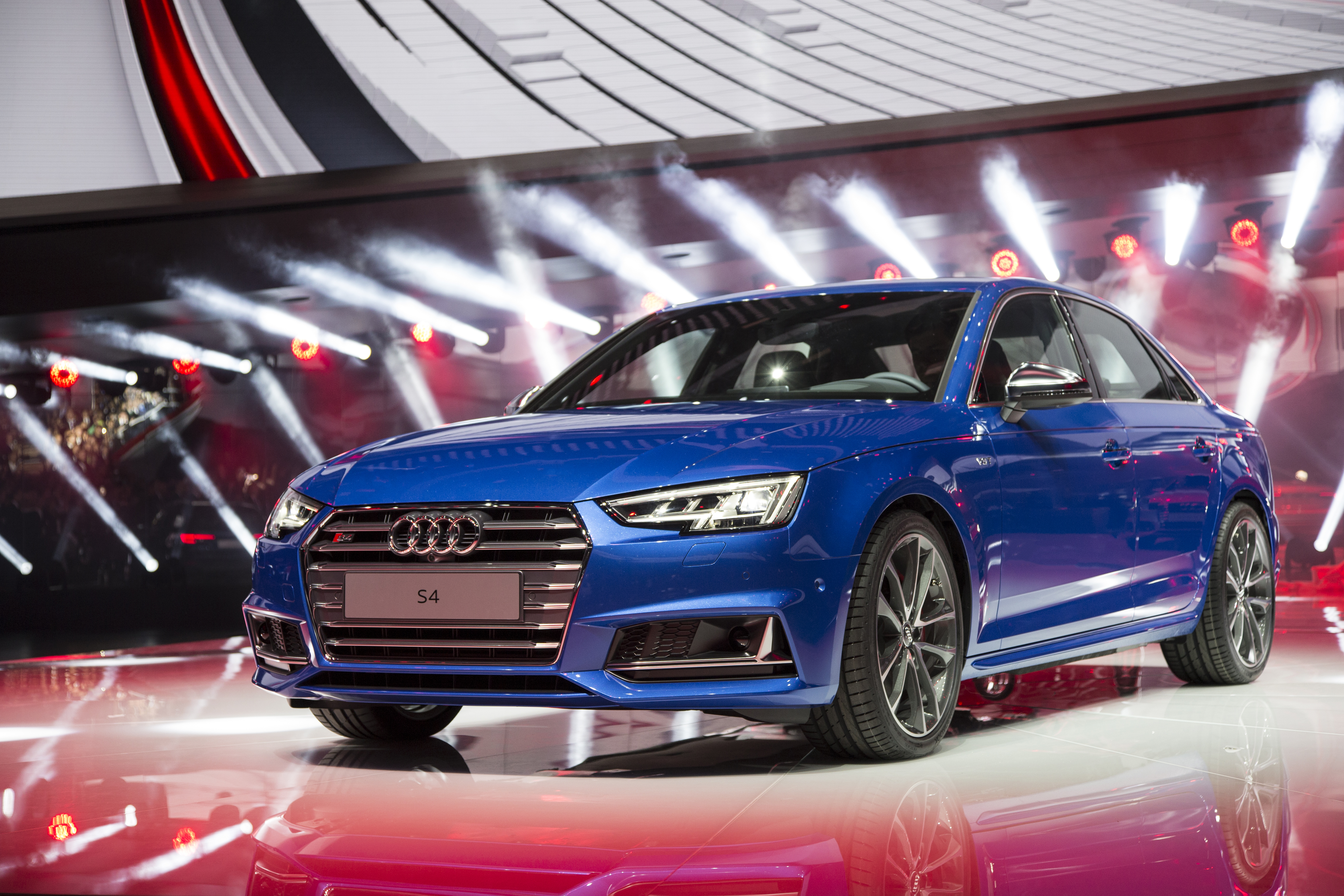 Der Audi S4 auf der Internationalen Automobilausstellung (IAA) in Frankfurt